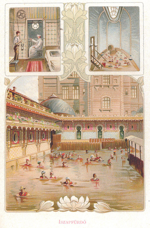 Szent Lukács gyógyfürdő iszaptava, ma már sem az iszaptó, sem a mór stílusú épület nem létezik